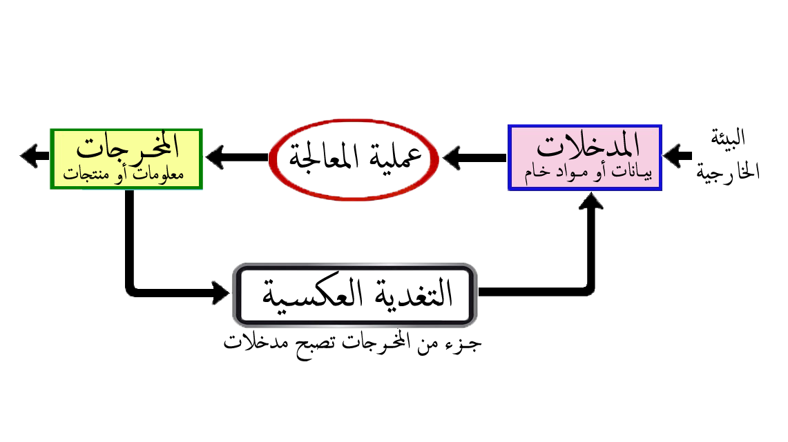 Dessin d’un système en arabe